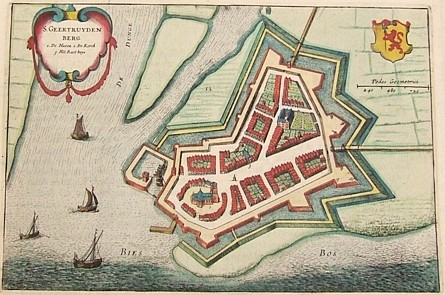 title: S. Geertruydenberg; size 15 x 23